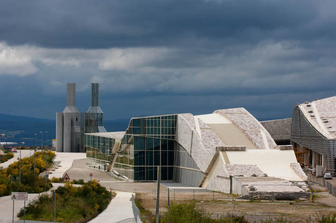 Posted via email from